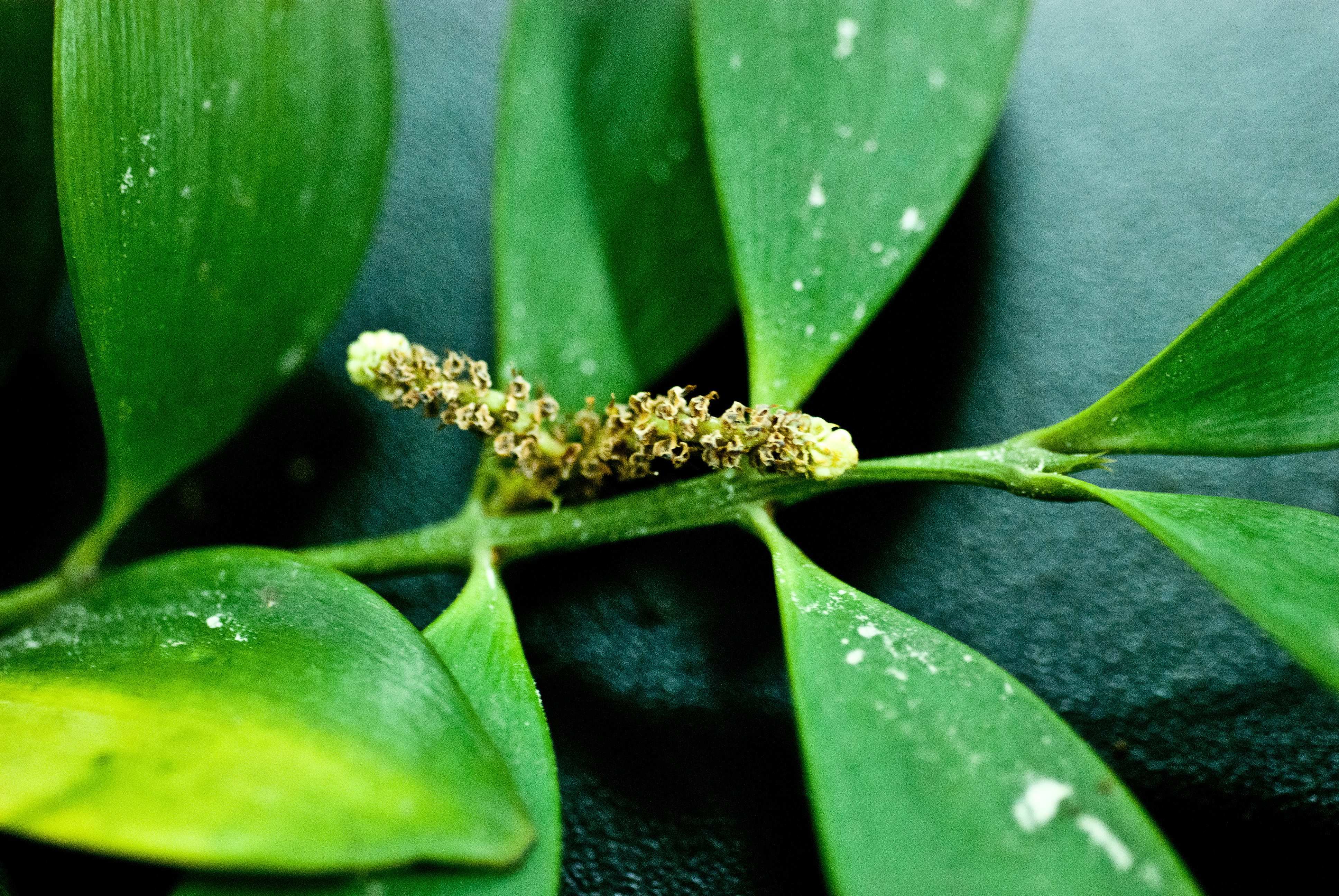 Nageia nagi, leaves and pollen cones